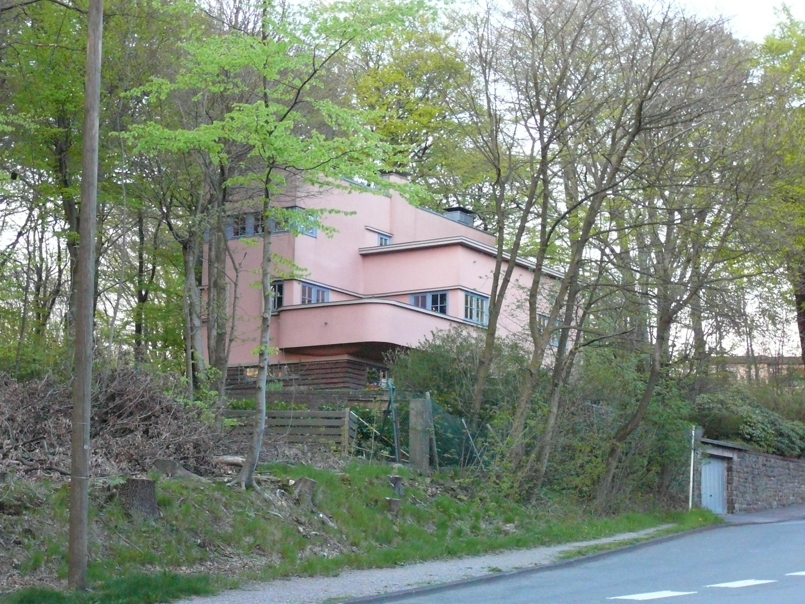 Obere Lichtenplatzer Straße, Wuppertal